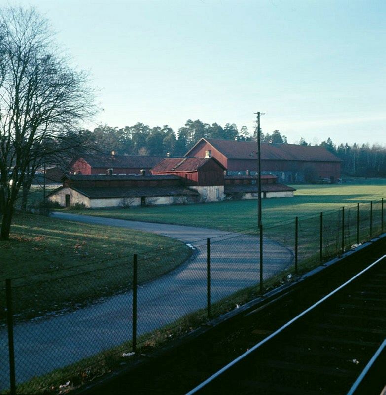 Åkeshov, Bromma, väster om Stockholm, 1967. Vy åt sydväst mot Åkeshovs stall, ladugårdar och skjul från perrongen vid Åkeshovs tunnelbanestation. År 1989 brann byggnaderna ner och senare revs byggnaderna. Sedan 1998 är detta platsen för Åkeshovs Arboretum. Stockholms stadsmuseum, Sweden. Bildnummer DIA 15079. (SSMDIA015079.)